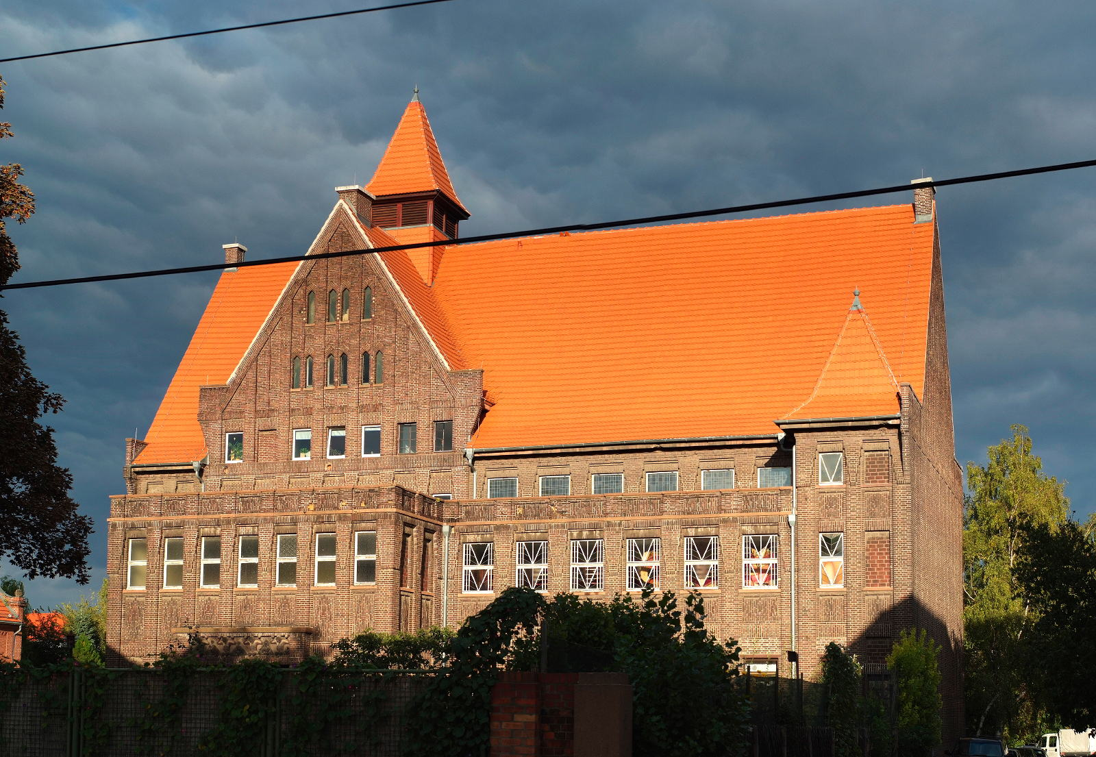 Christuskirche in Halle-Ost